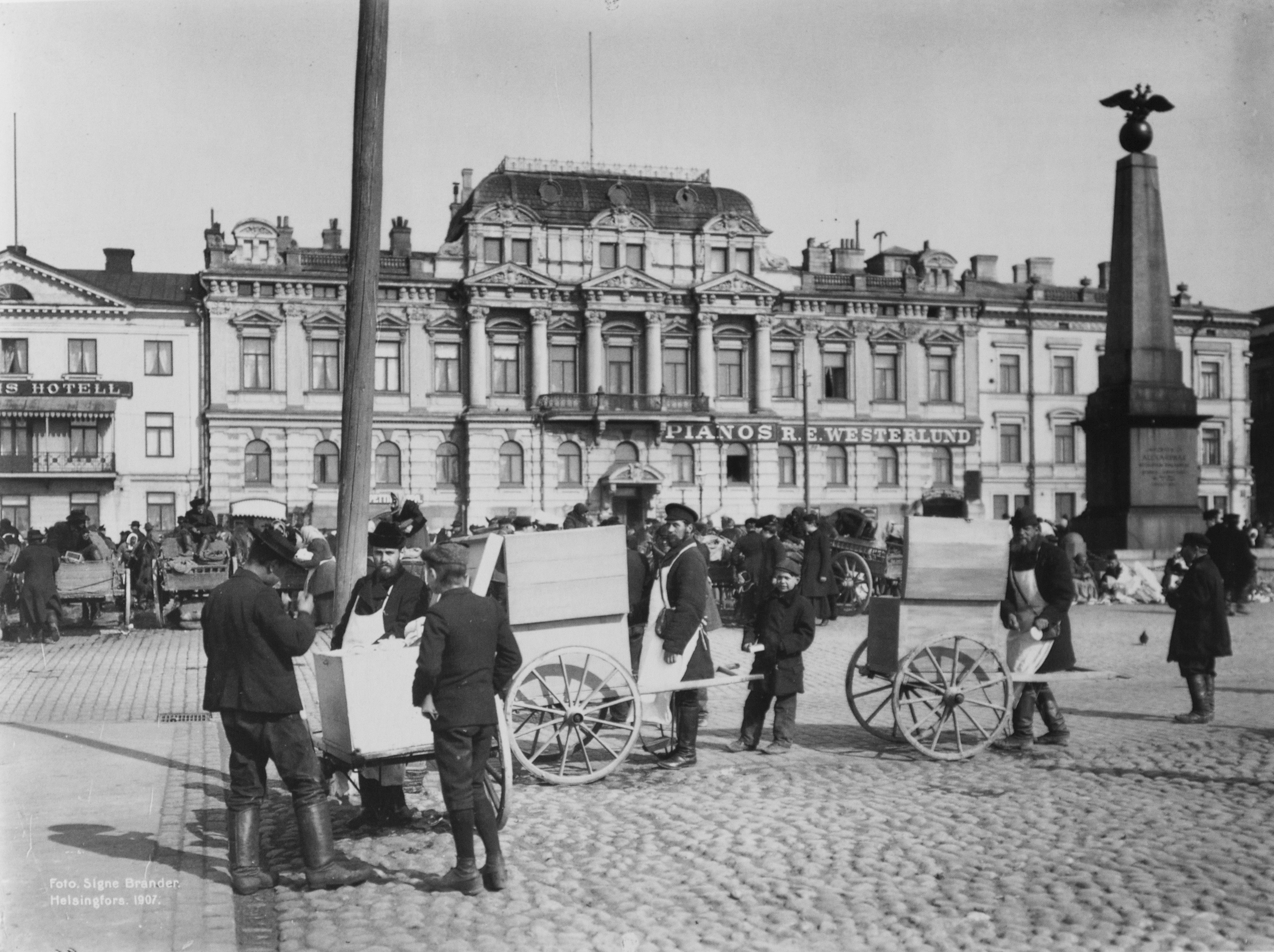 Venäläisiä jäätelökauppiaita Helsingin Kauppatorilla vuonna 1907.